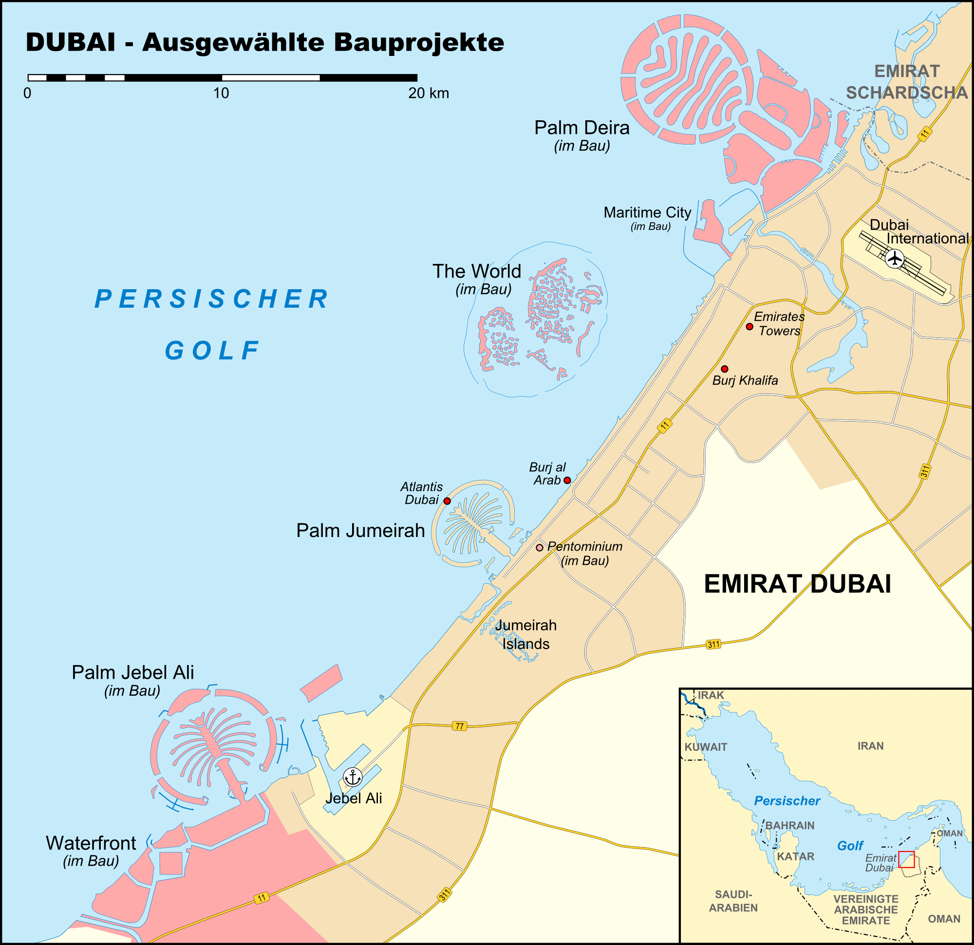 Karte der Bauprojekte in Dubai (Palm Jebel Ali, Palm Jumeirah, Palm Deira, The World, The Universe, Waterfront u.a.), Stand: Januar 2010